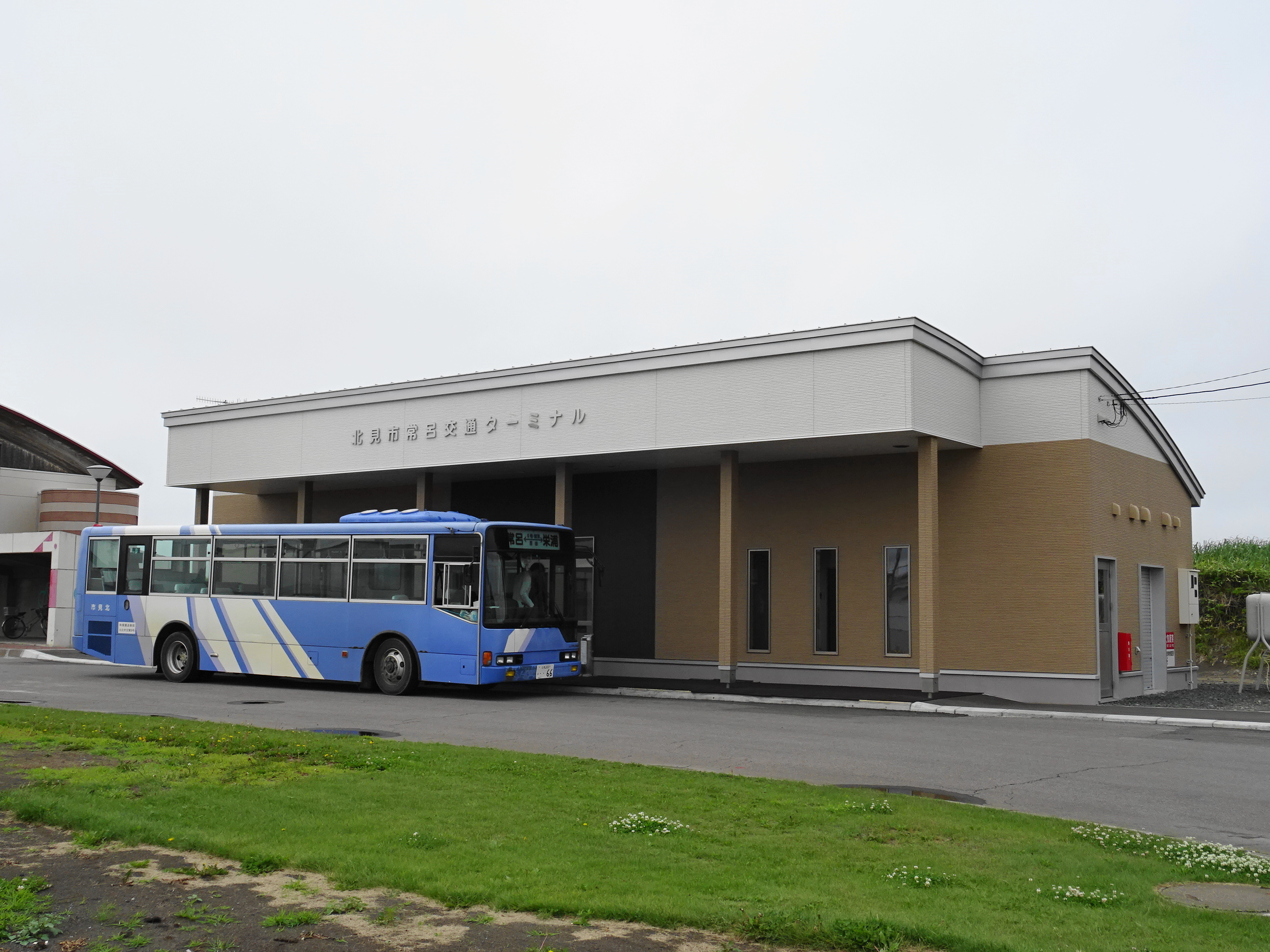 Tokoro depot